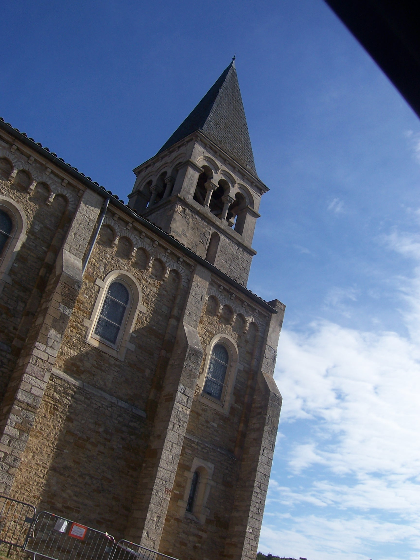 Eglise de Plottes